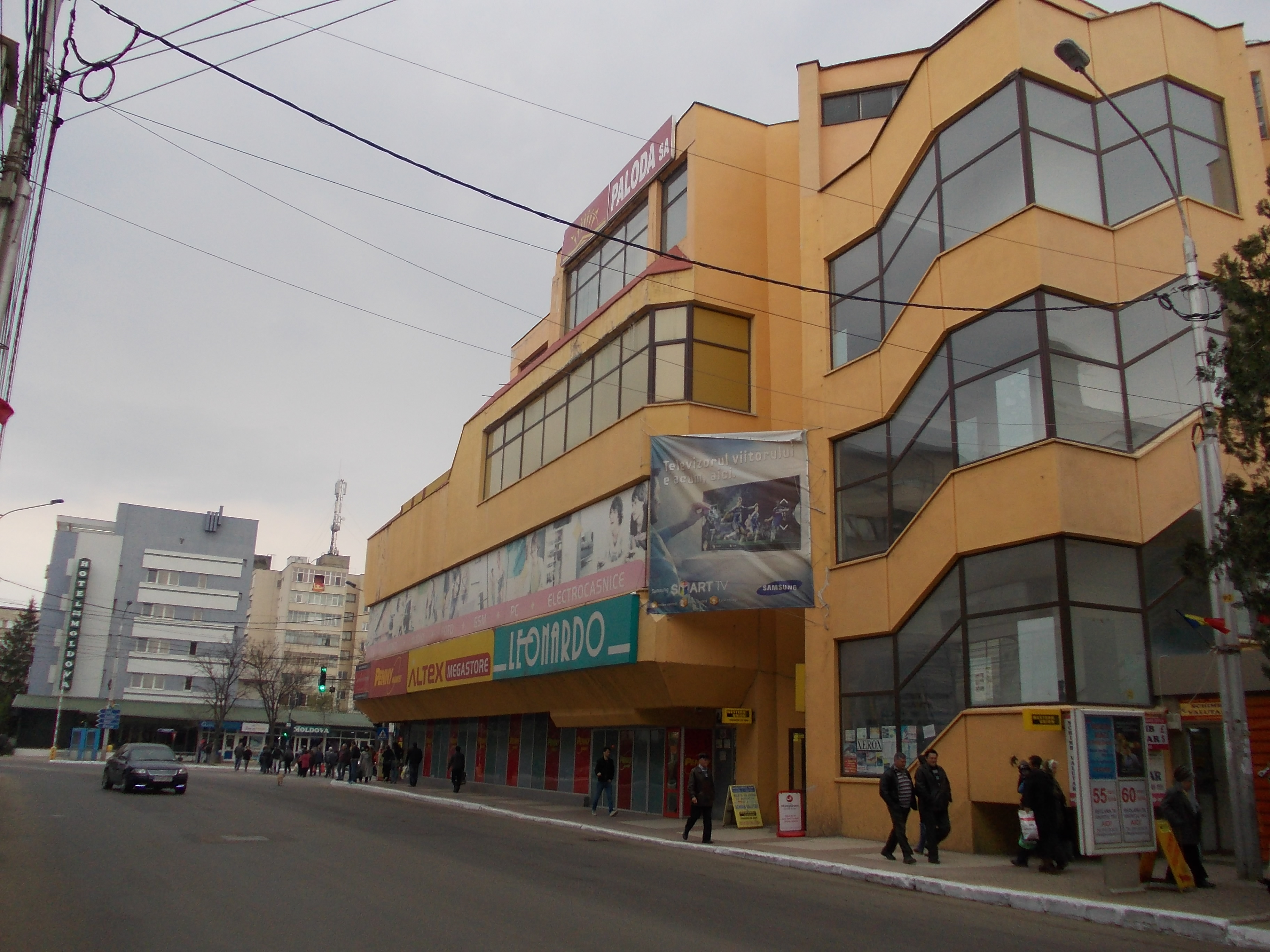 vedere din zona centrală